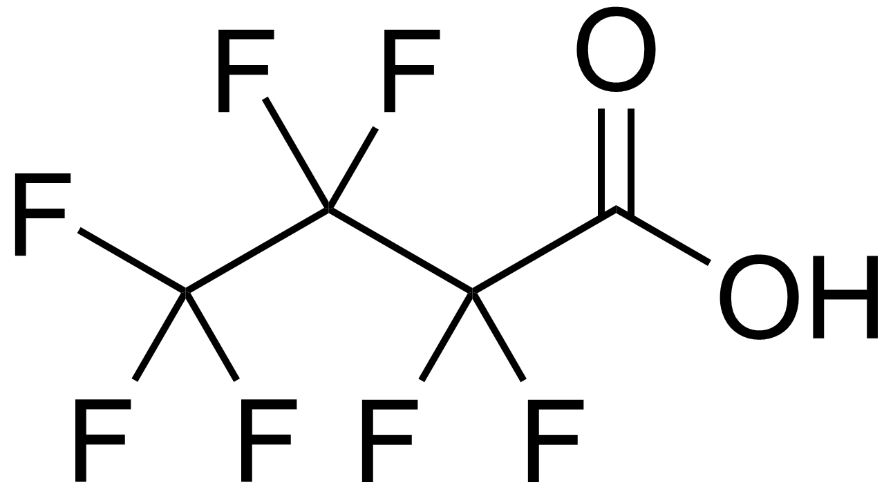 chemical structure of heptafluorobutyric acid (heptafluorobutanoic acid, perfluorobutyric acid, perfluorobutanoic acid)